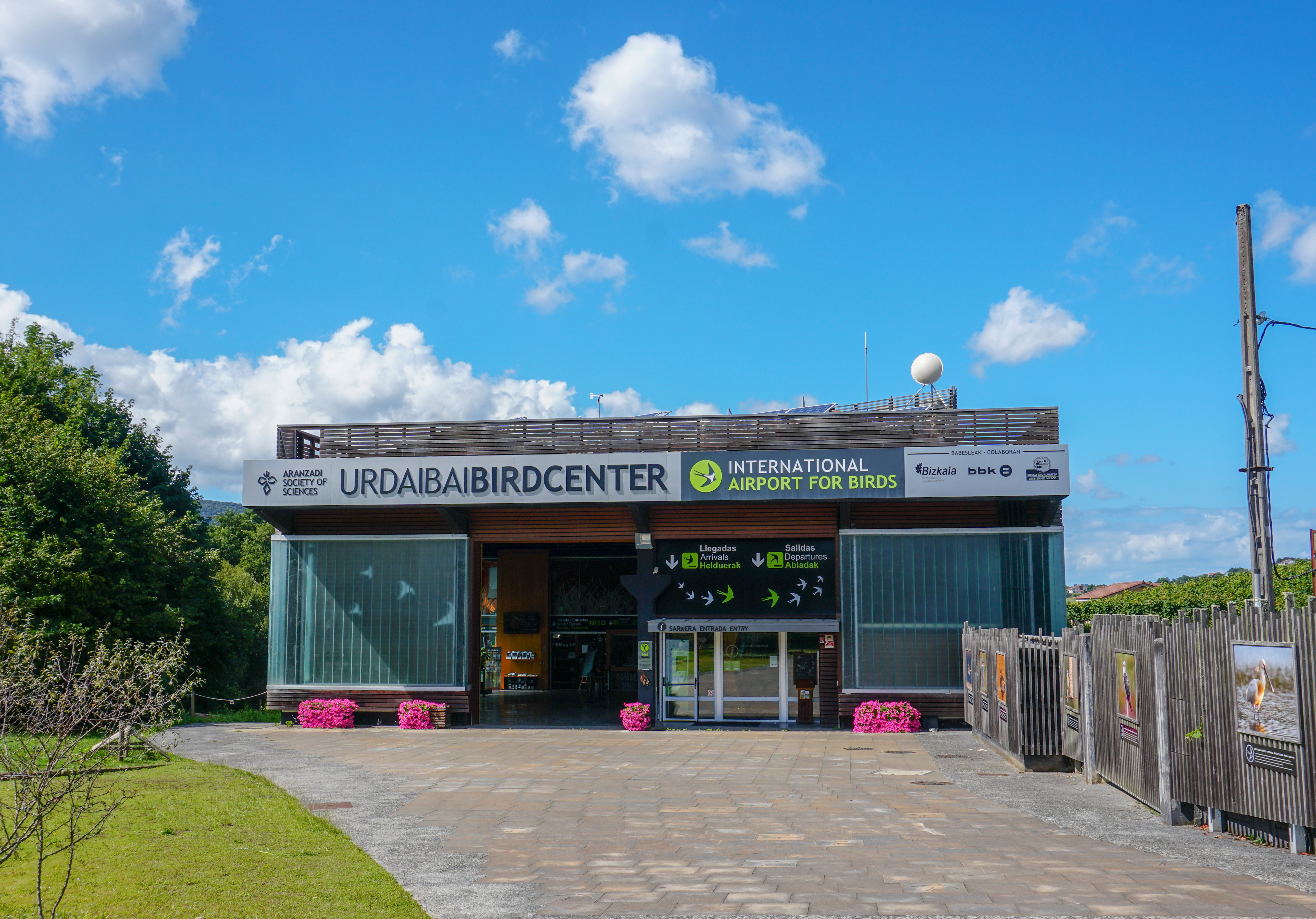 Fachada principal del Urdaibai Bird Center